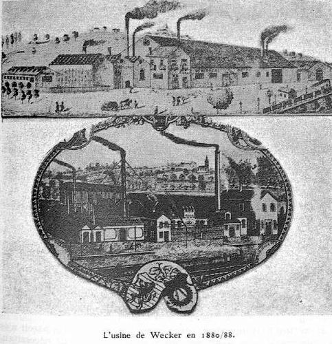 Dem André Duchscher seng Fabréck zu Wecker, 1880 - 1888.